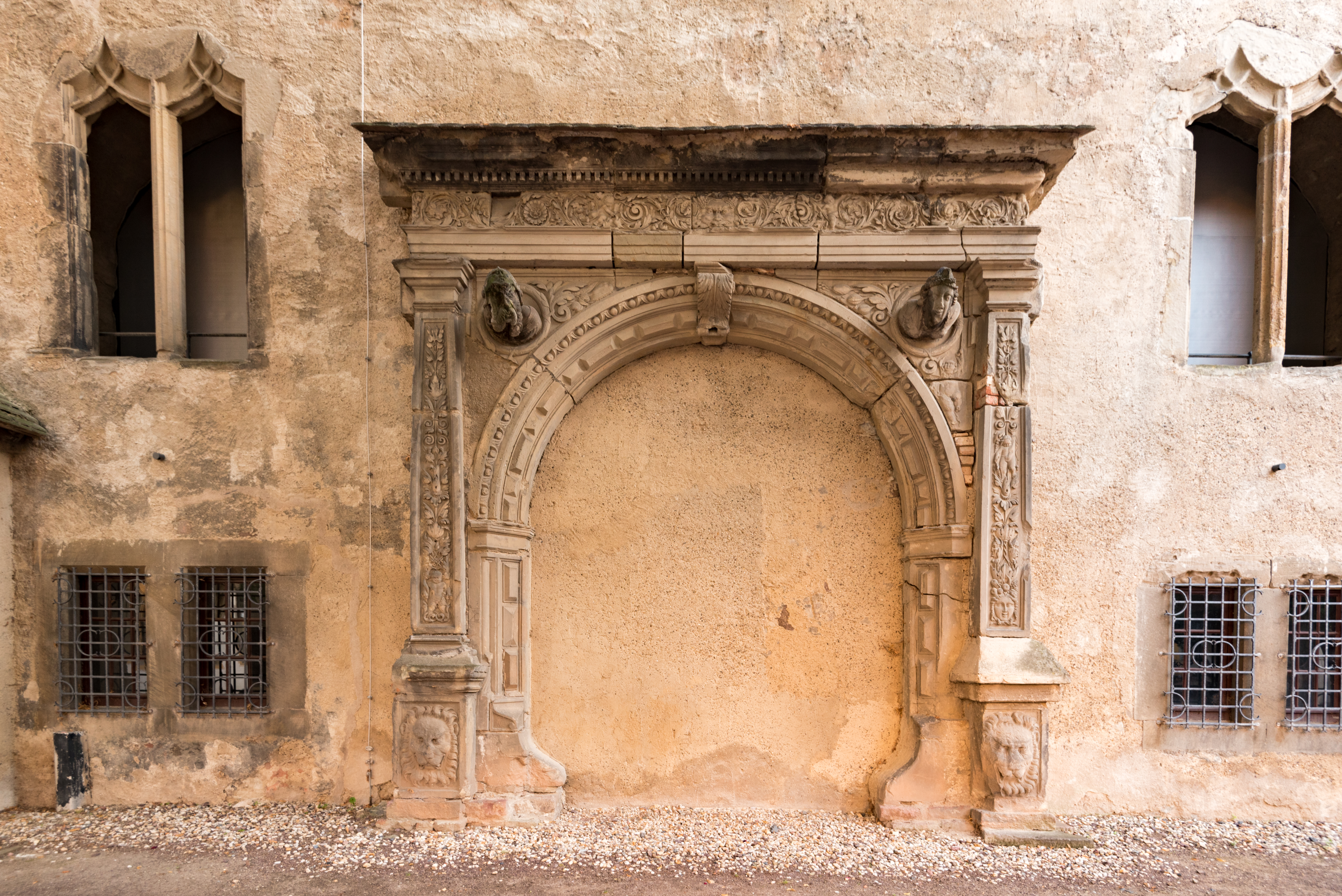 Halle (Saale), Moritzburg, Ansicht des Innenhofs, Rest des Renaissance-Portals der Ratswaage